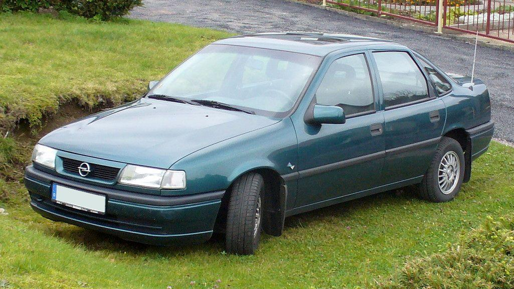 Opel Vectra A